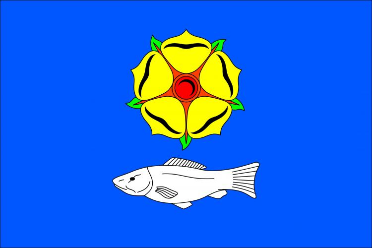 Dolní Kralovice vlajka